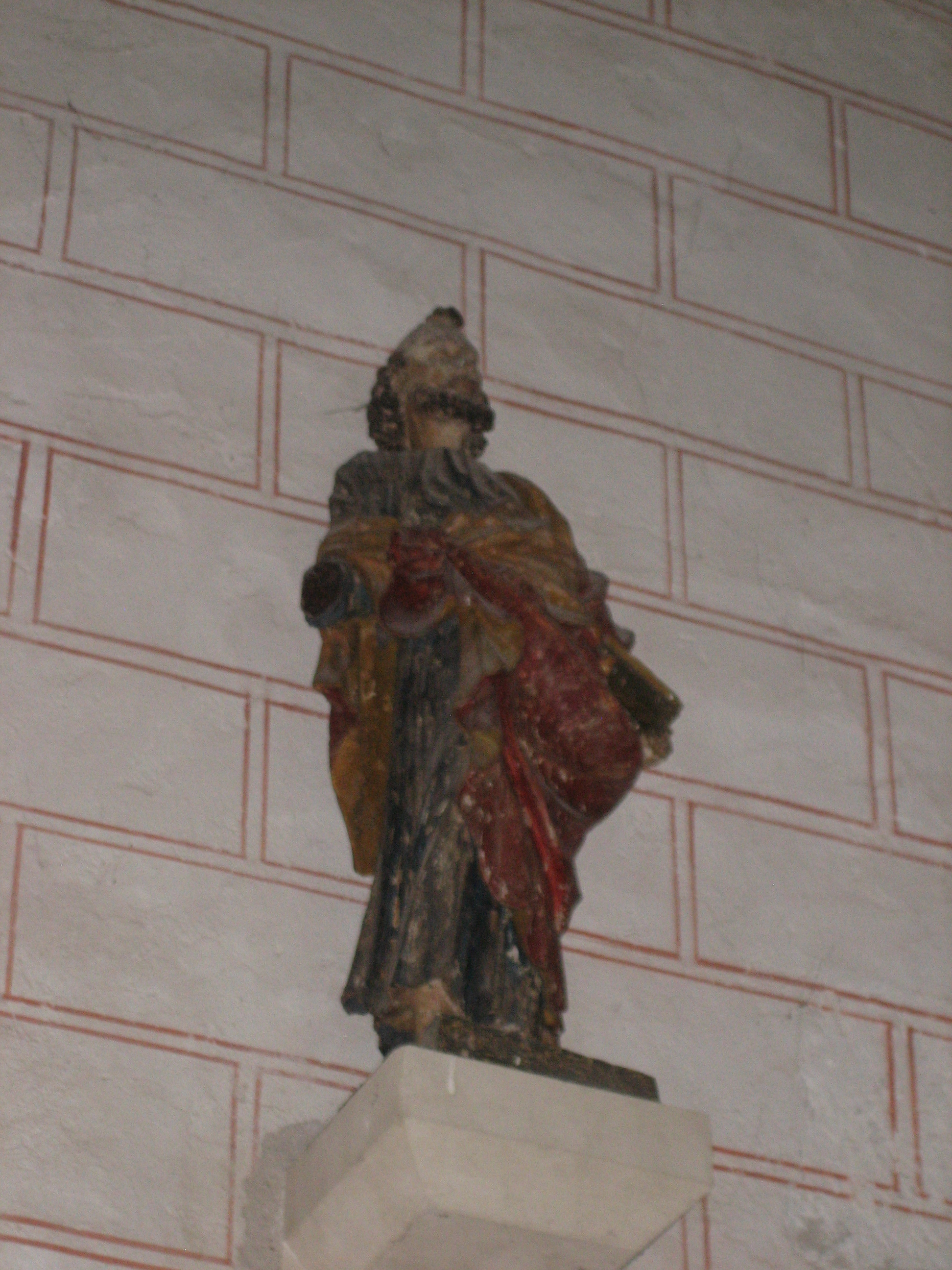 Images de la commune et de l'église